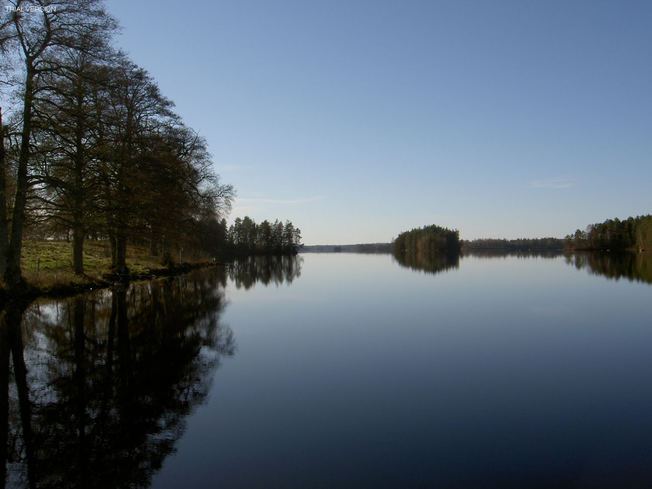 Vy över Jällunden en stilla dag från Jälluntofta mot söder.